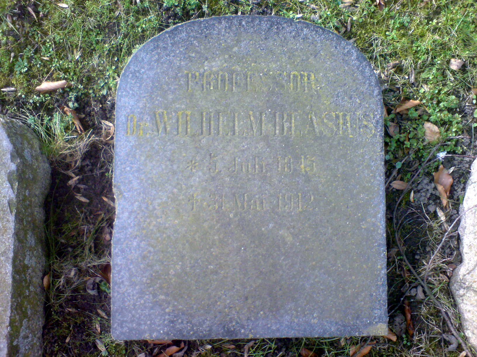 Grabinschrift: "Professor Dr. Wilhelm Blasius * 5. Juli 1845, + 31. Mai 1912". Foto aufgenommen auf dem Friedhof der Reformierten Gemeinde (Braunschweig, Juliusstrasse).